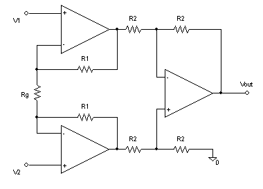 Amplificador de instrumentación Imagen creada por el usuario Murphy sujeta a las condiciones de la licencia GFDL.